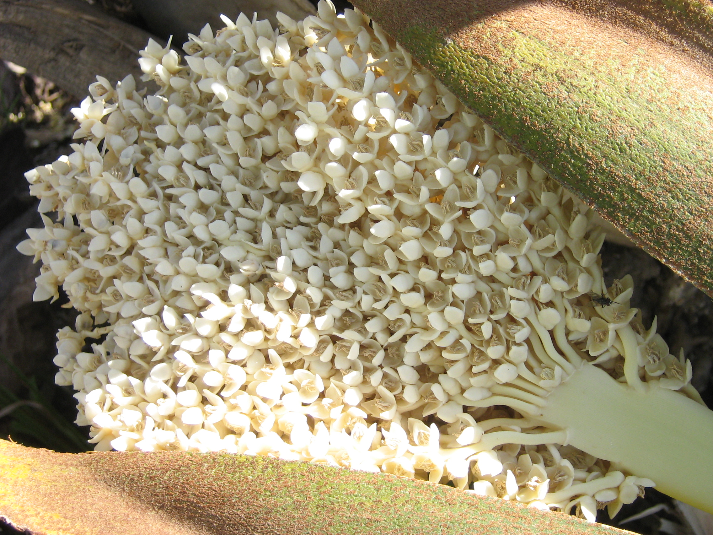 Цветущая финиковая пальма. Ливия.